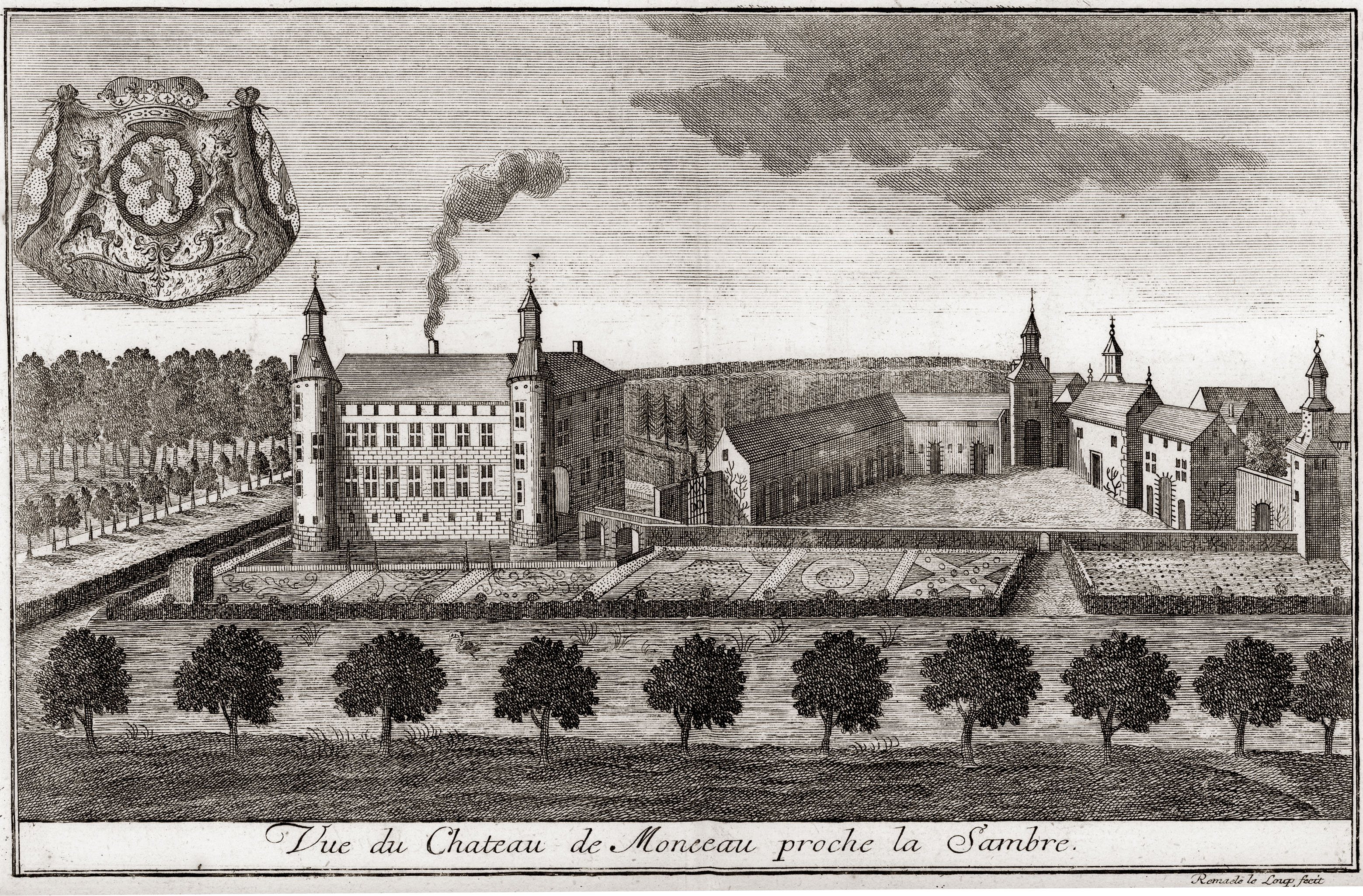 "Vue du Château de Monceau proche la Sambre" (224x146), gravure sur cuivre de Remacle Le Loup extraite des "Délices du païs de Liége" (5 vol., 1738-1744) sous la direction de Pierre-Lambert Saumery